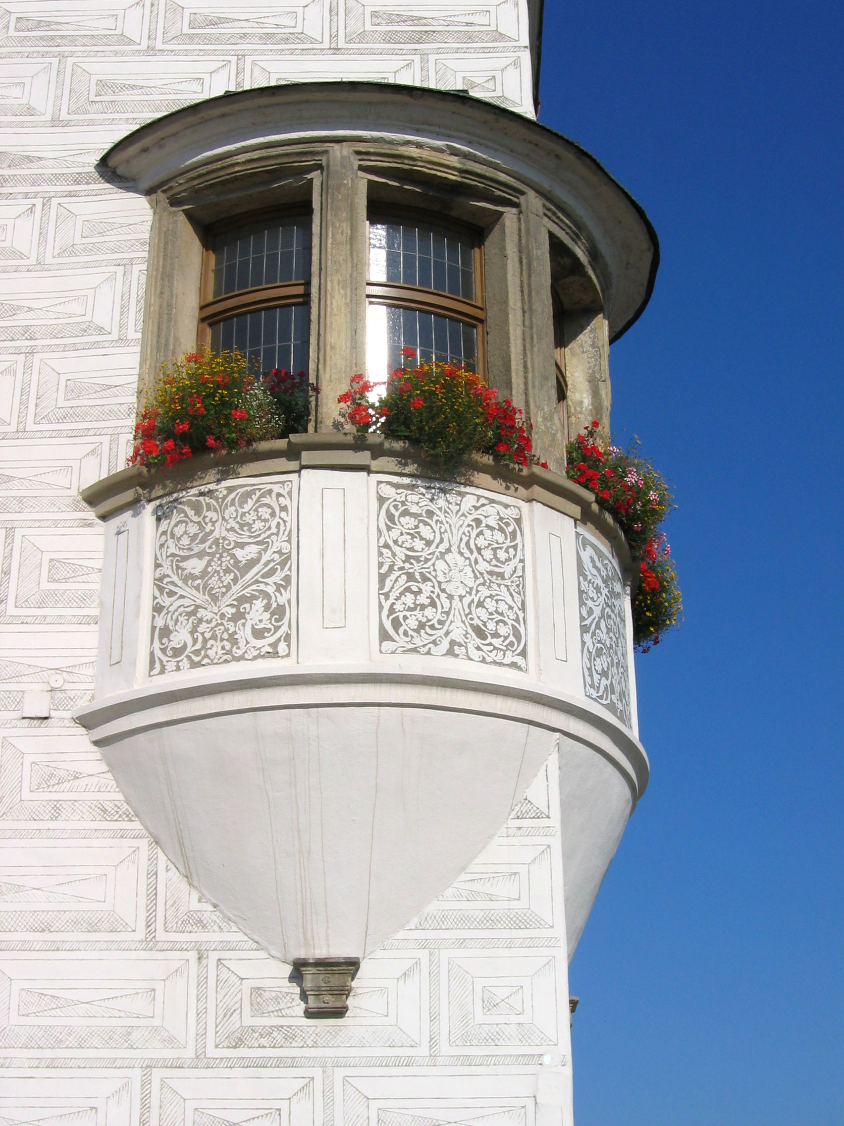 Renesanční arkýř radnice v Kyjově